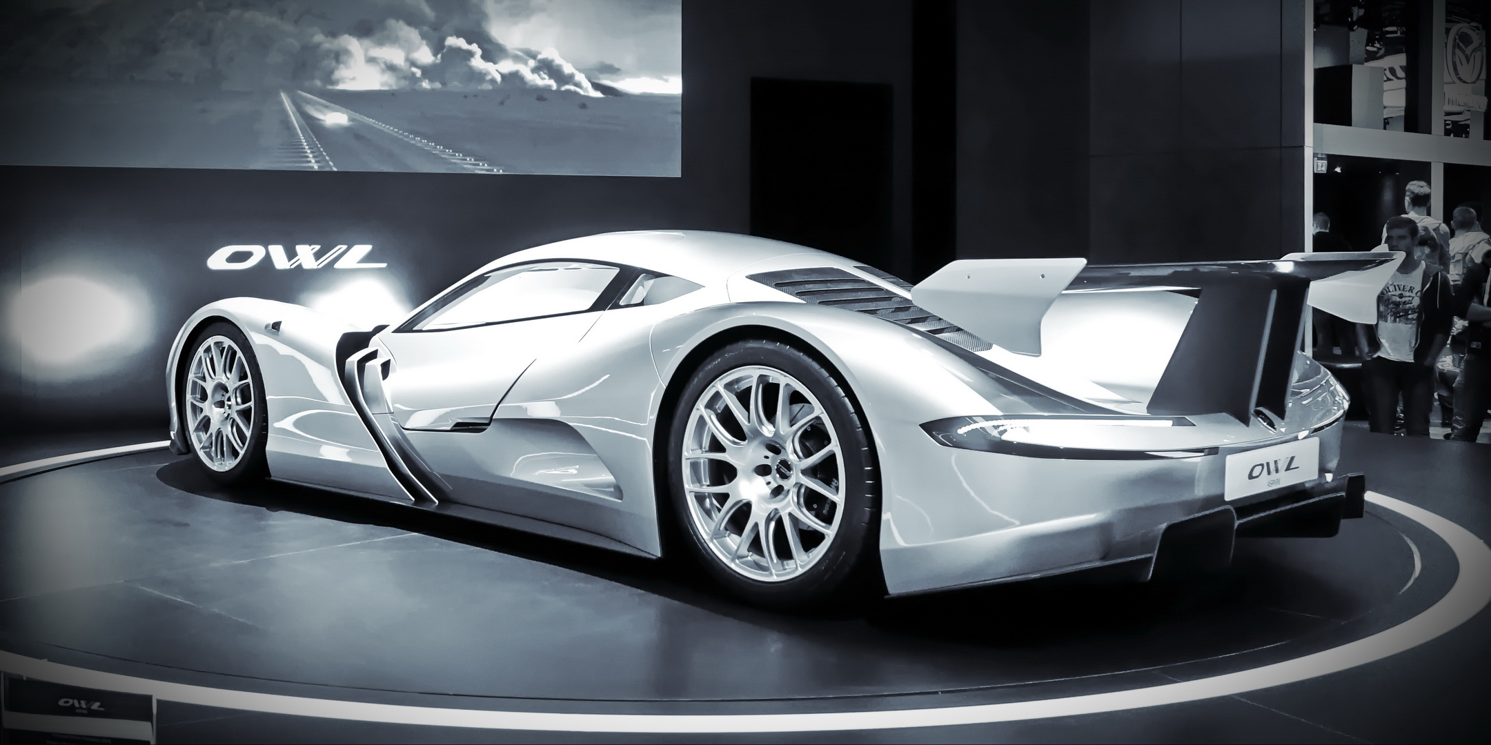 Aspark Owl